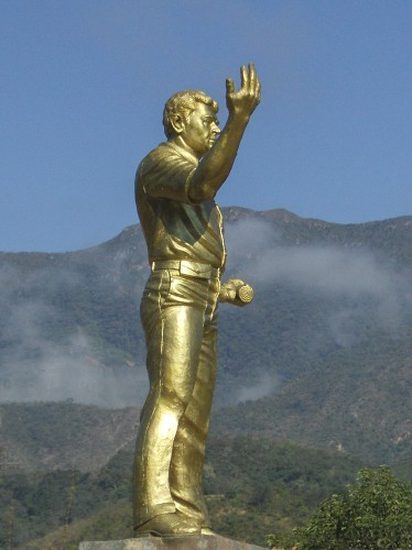 Monumento al Dr. Enrique Parada Aguilera patricio de Camiri